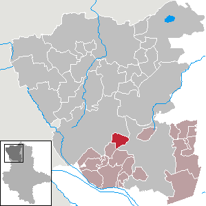 (Original text: Breitenfeld im Altmarkkreis Salzwedel)